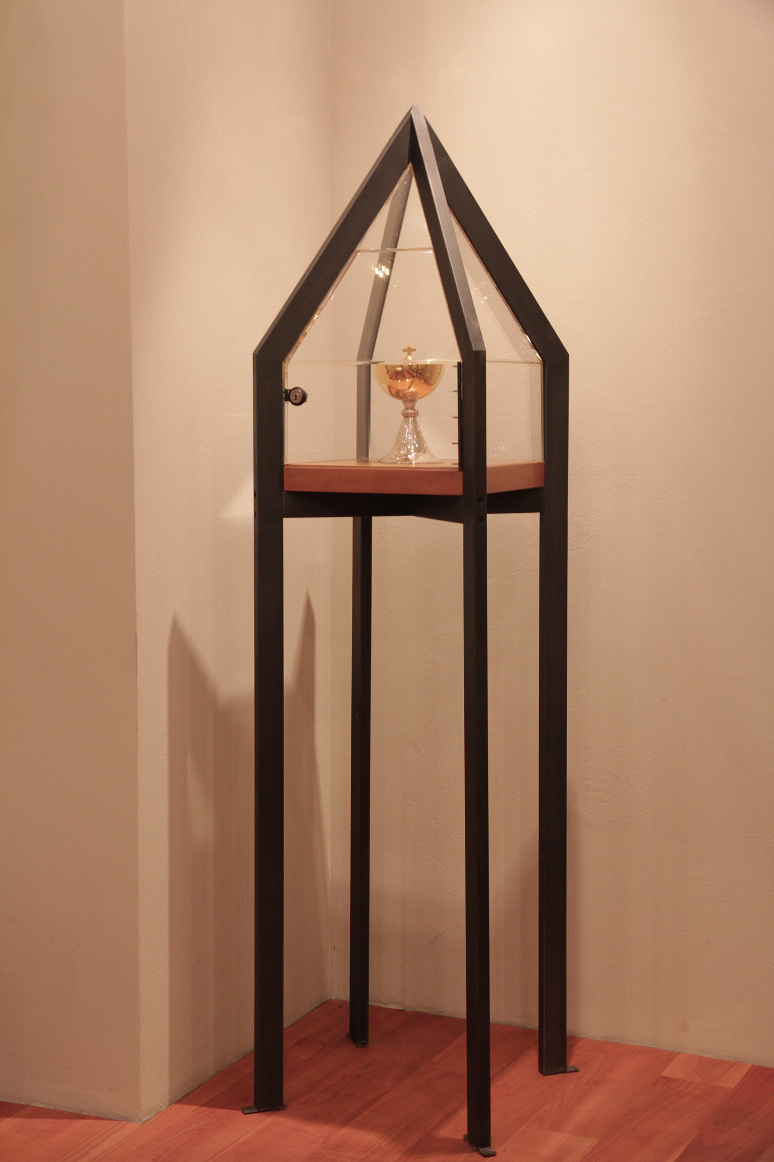 Römisch-katholische Pfarrkirche Dreikönigen Zürich-Enge, Tabernakel in der Krypta